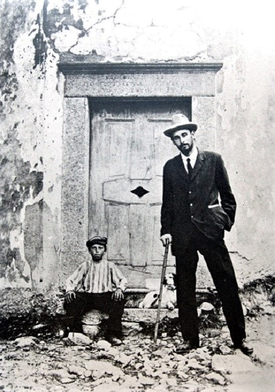 Giovanni Boine a Ponte di Nava nel 1911 sulla via di Viozene e Upega